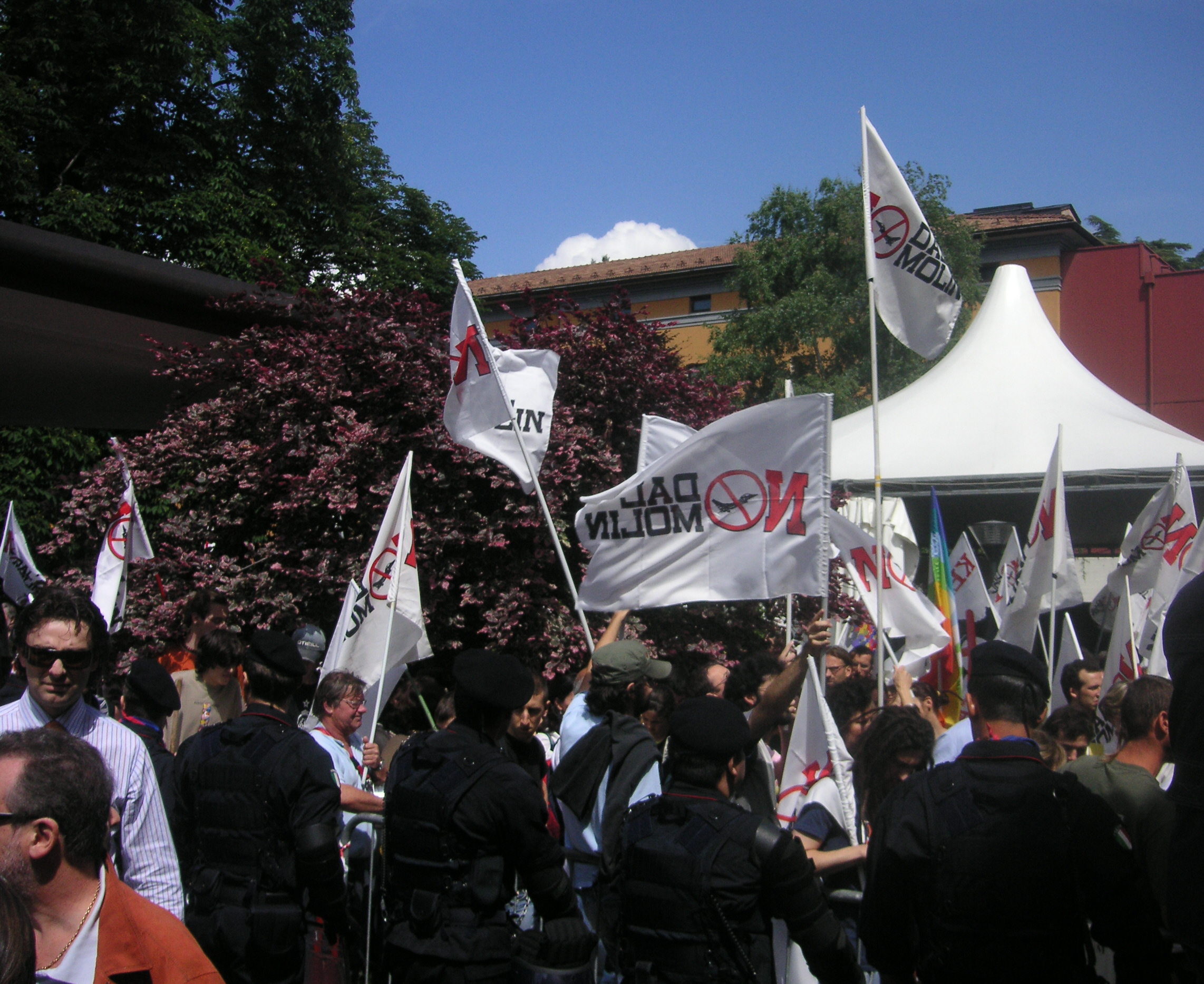 La polizia e i sostenitori del movimento No Dal Molin fuori dall'Auditorium S. Chiara in occasione del forum con Romano Prodi al Festival dell'Economia 2007.